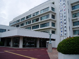 Chigasaki City Hall in Kanagawa Prefecture, Japan